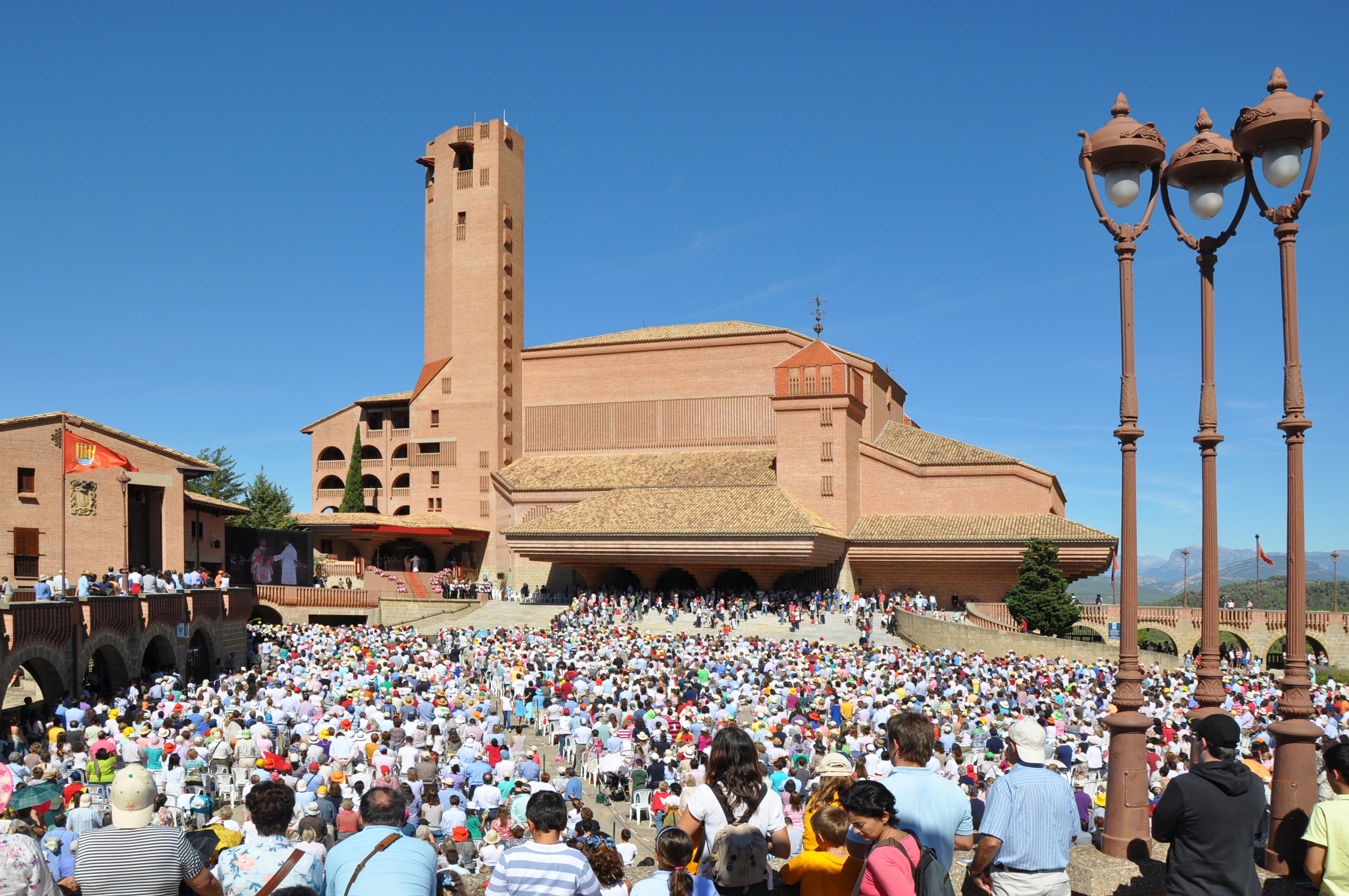 Vista general del Santuari de Torreciutat